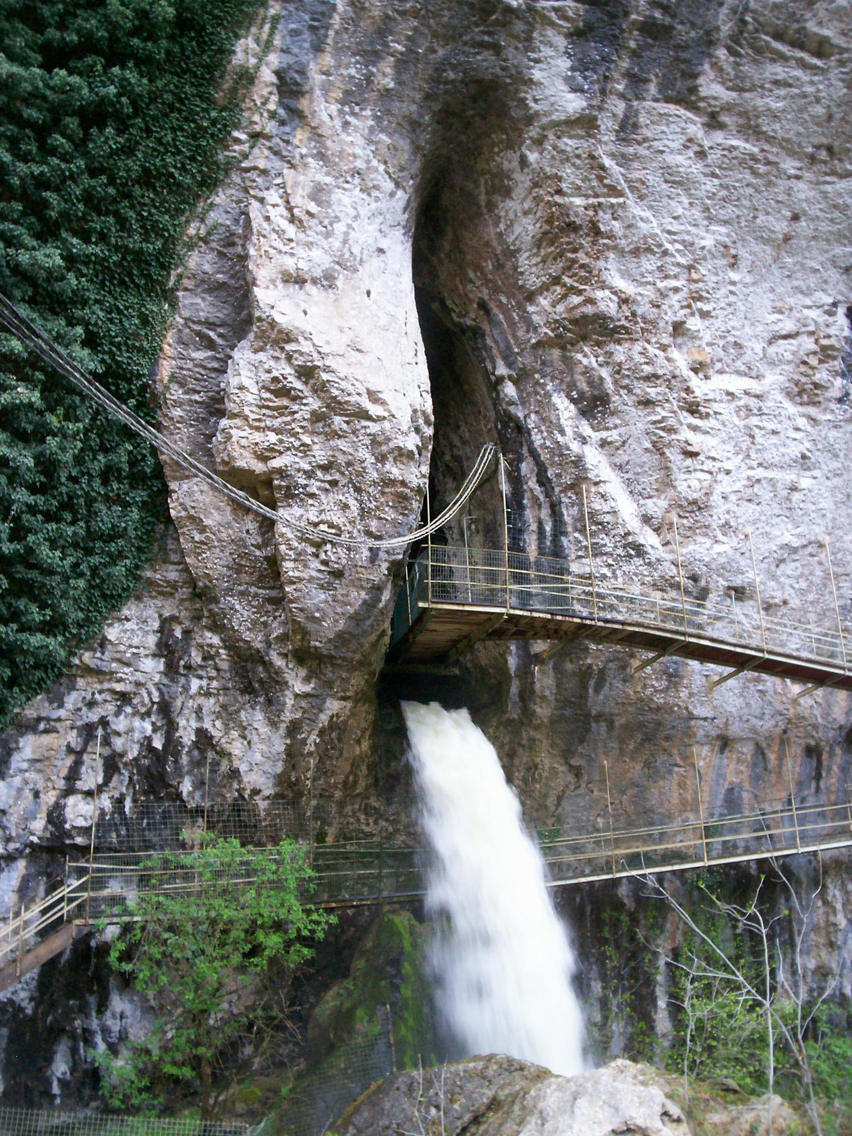 La source du Dard à l'entrée de la grotte de Baume-les-Messieurs.